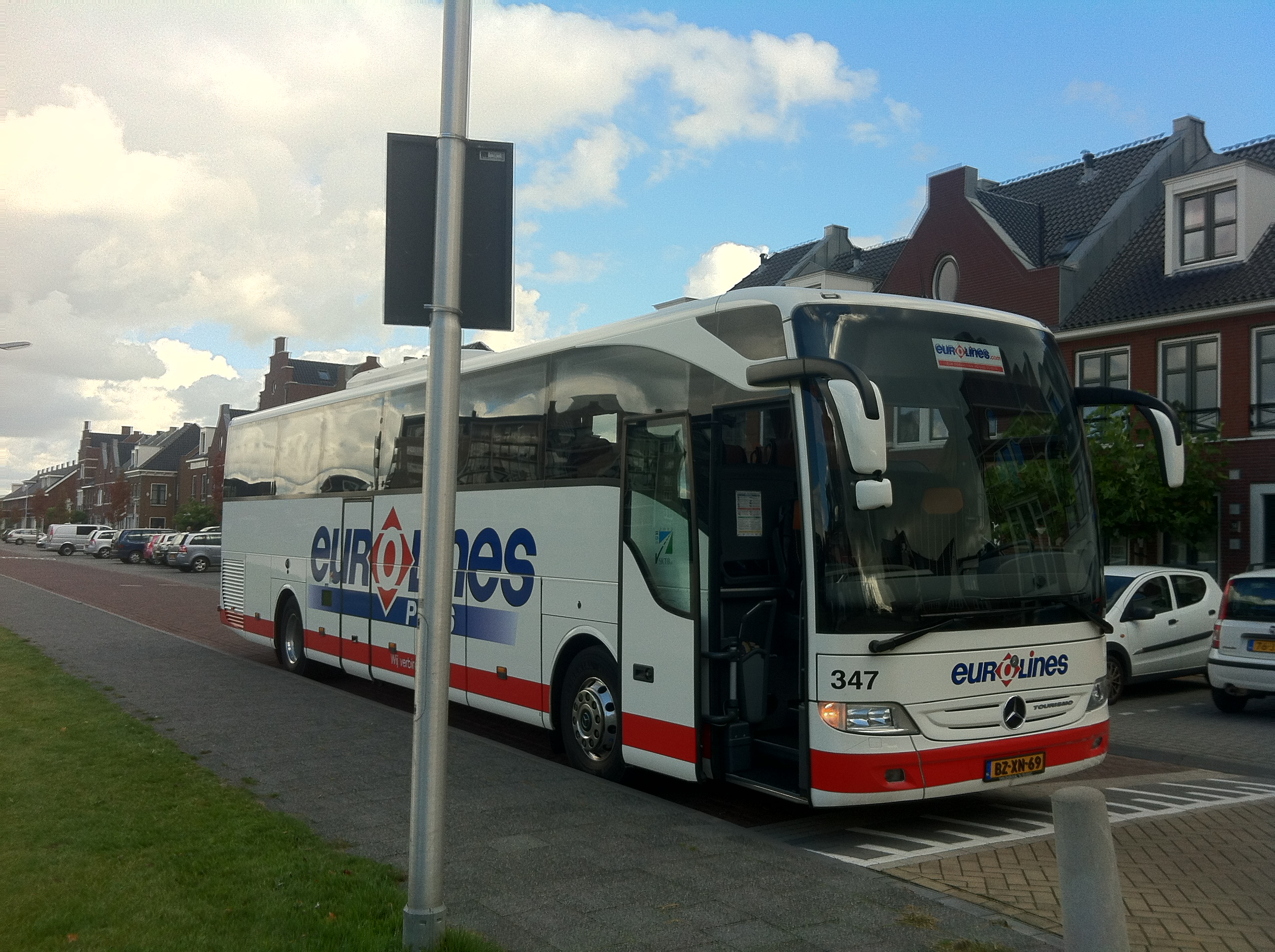 Eurolines bus van de firma Bovo Tours (NL)